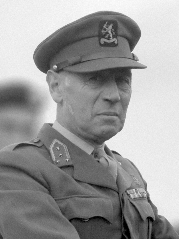 Driedaagse militaire oefening voor het 43e regiment infanterie van de Harskamp. Generaal Hasselman 30 juli 1957